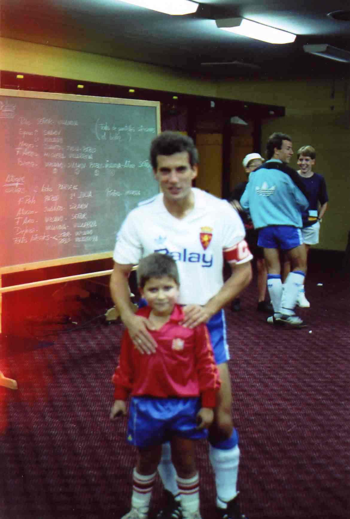 Foto Privado